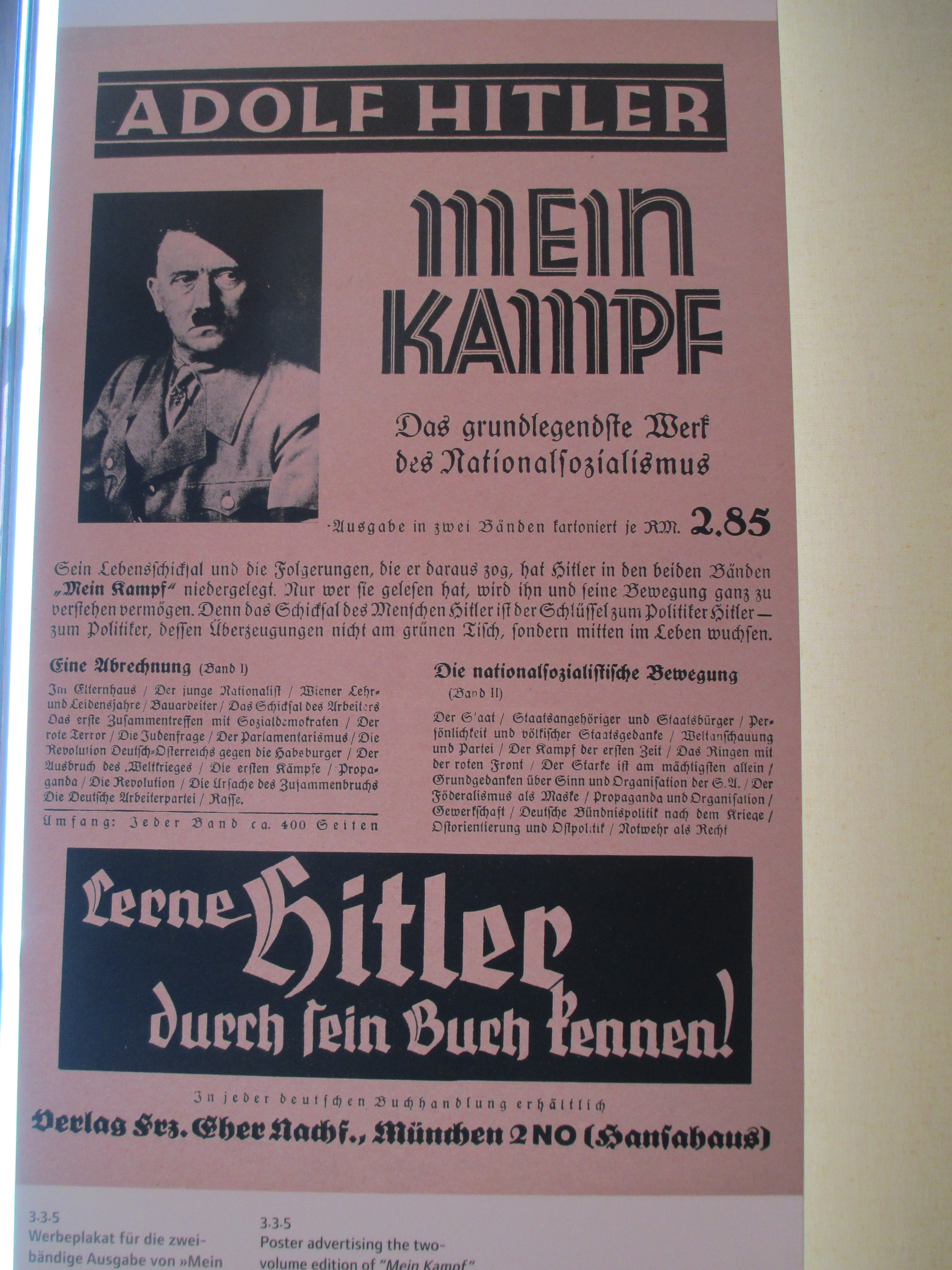 מודעת פרסומת ל"מיין קמפף" בוילה ואנזה